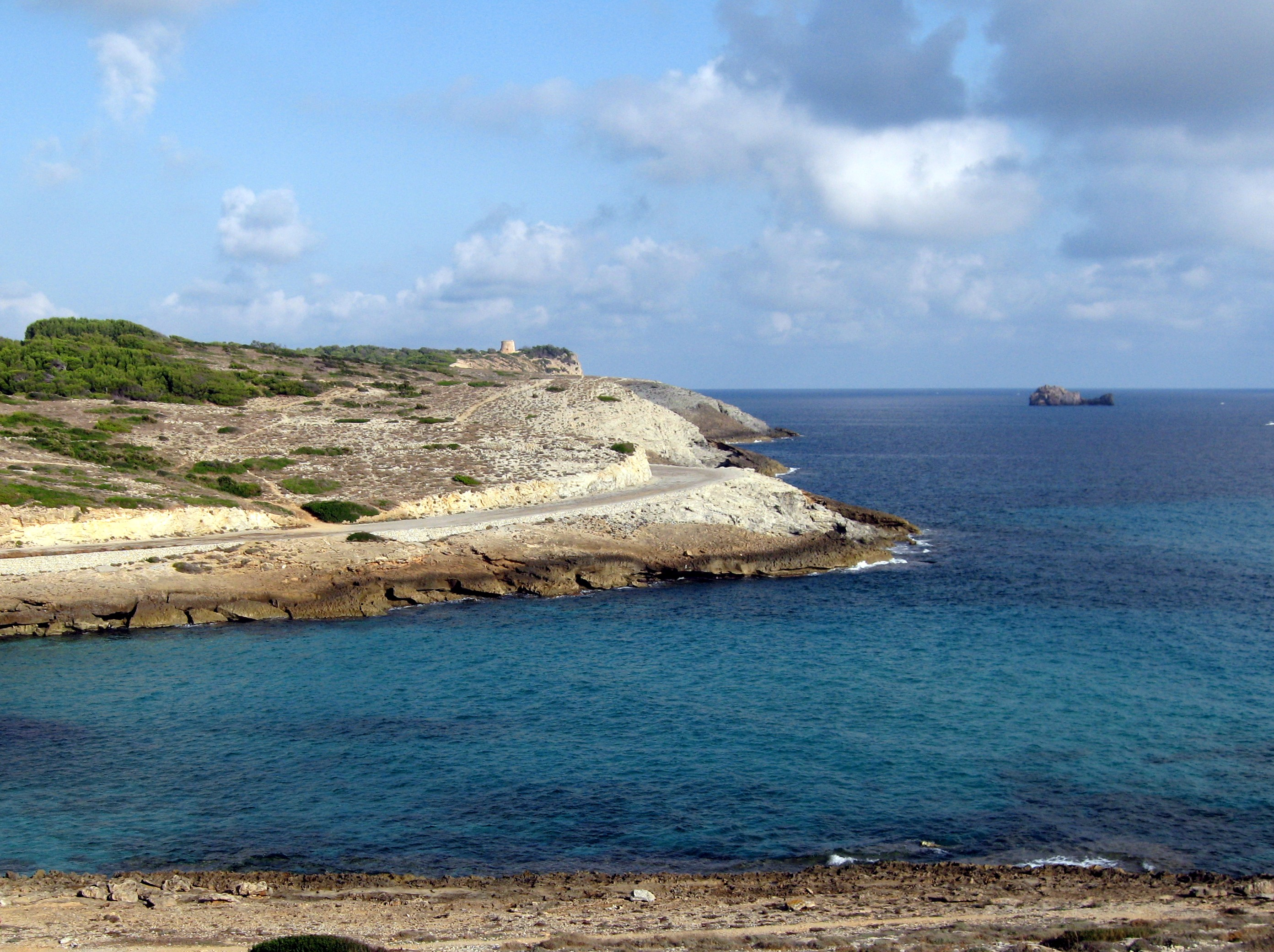 Cala Mitjana, Artà, Mallorca, Spain